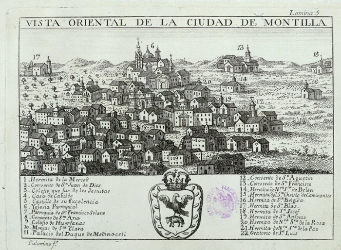 Mapa de la vista oriental de Montilla, localizado en la obra Atlante Español o Descripción Geográfica, Cronológica e Histórica de España.... de Bernardo Espinalt y García. 1778-1795